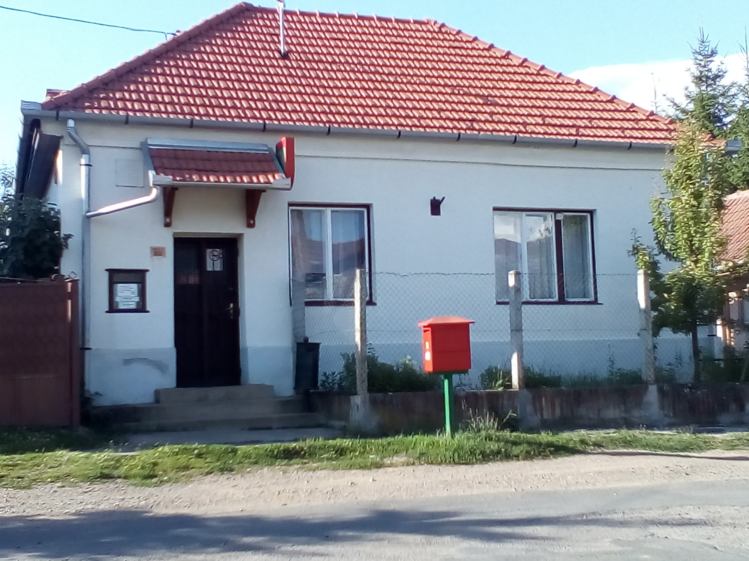 Posta, Bodony